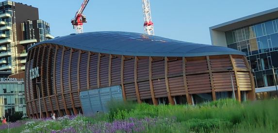 Ibm studios 8 giugno 2019